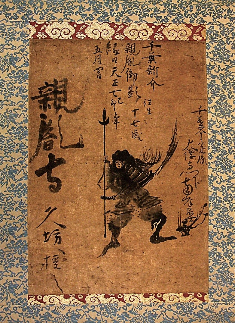 千葉親胤の肖像画。